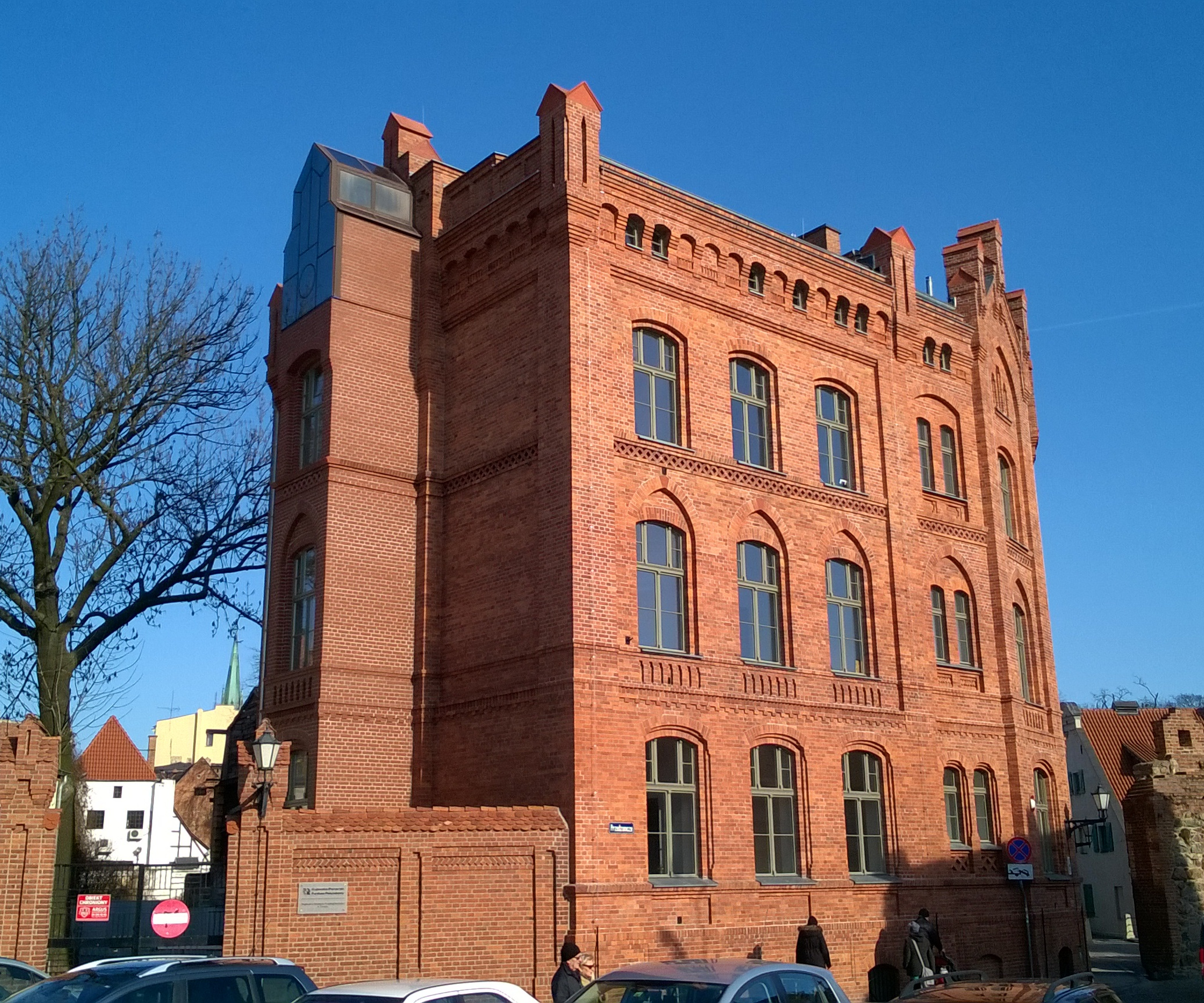 Regionalne Inkubatory Przedsiębiorczości KPFP w Toruniu